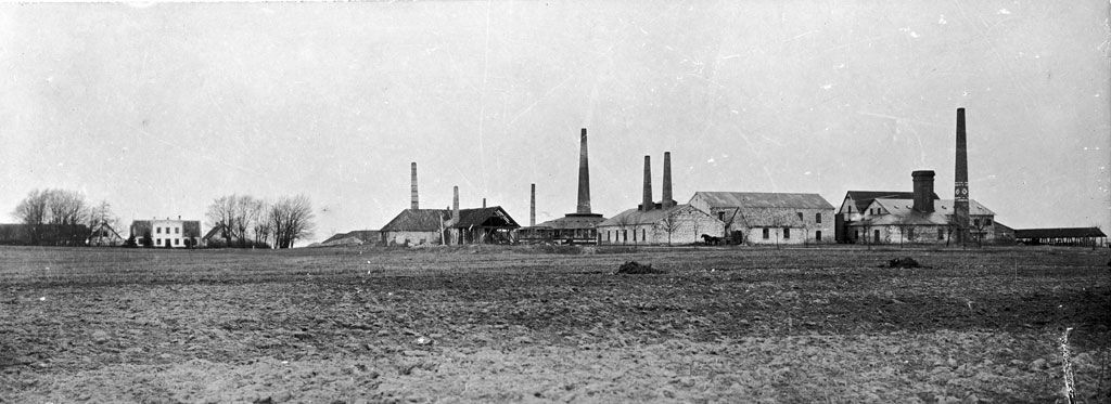 Hakkemose Teglværk, former brickyard in Taastrup, Denmark